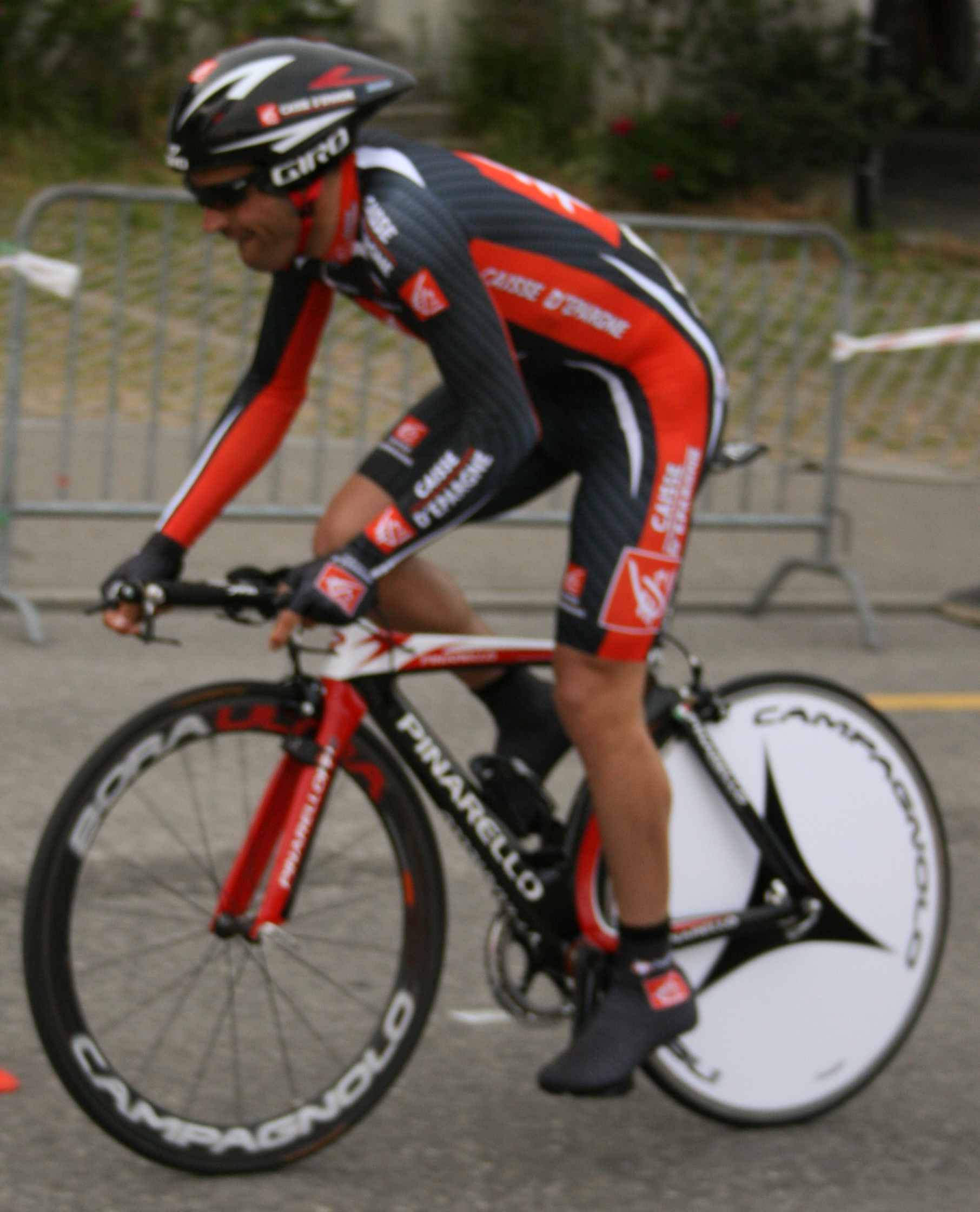 Oscar Pereiro Sio prologue du Tour de Romandie 2007